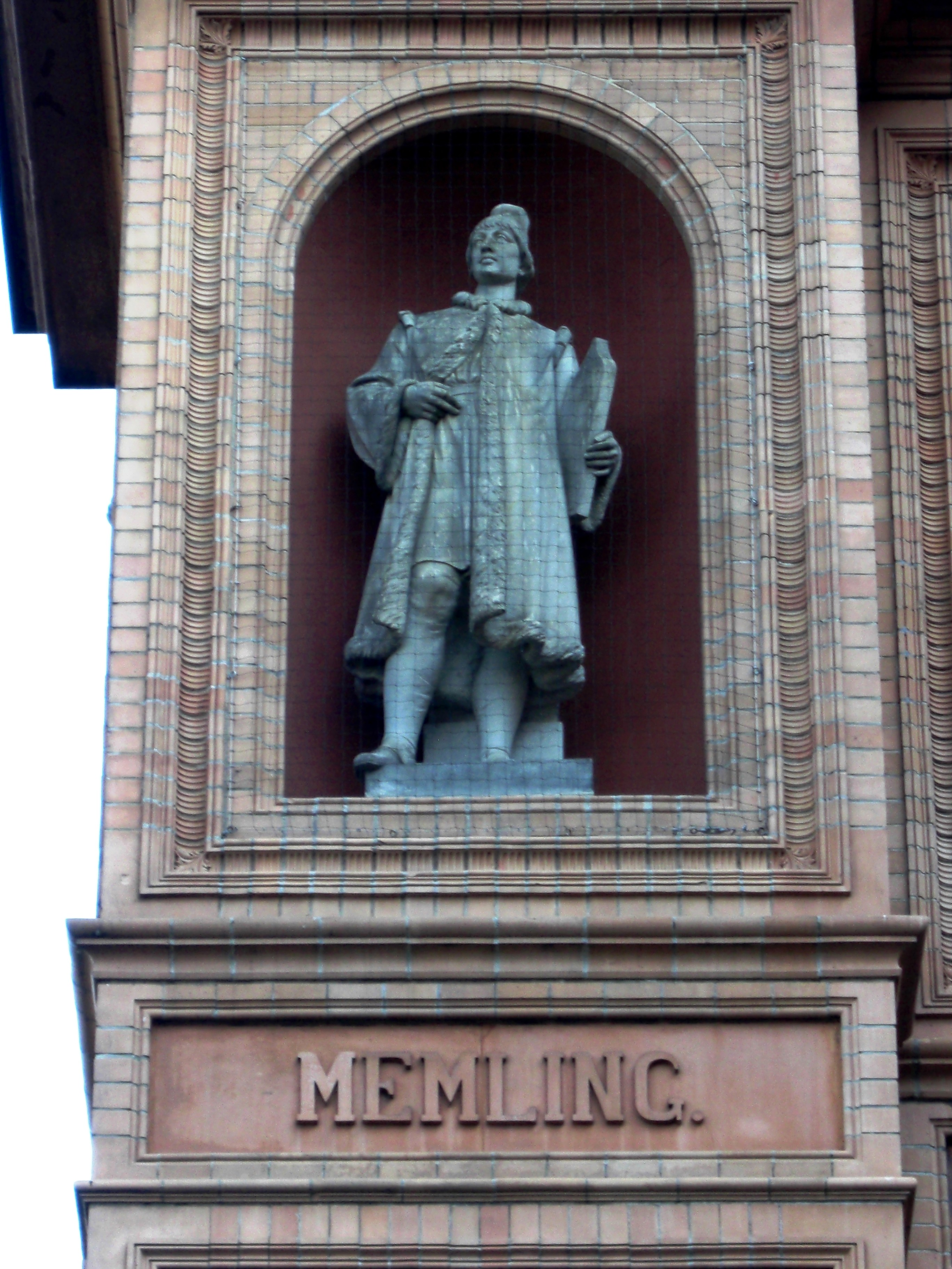 Denkmal für Hans Memling; Kunsthalle HamburgThis is a photograph of an architectural monument.